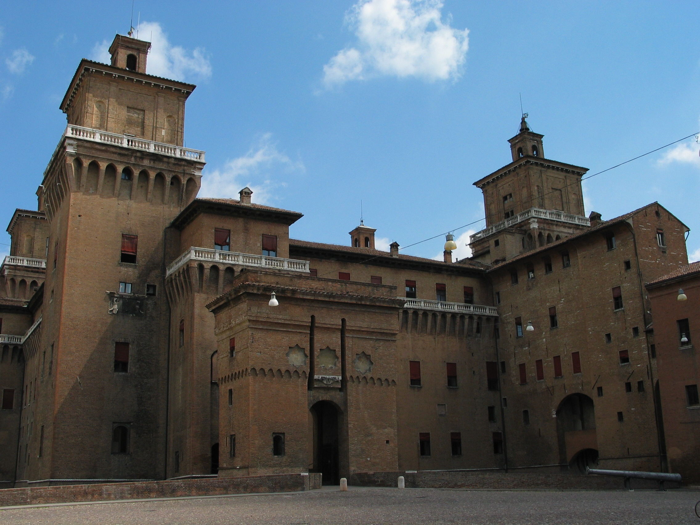 Palais d'Este